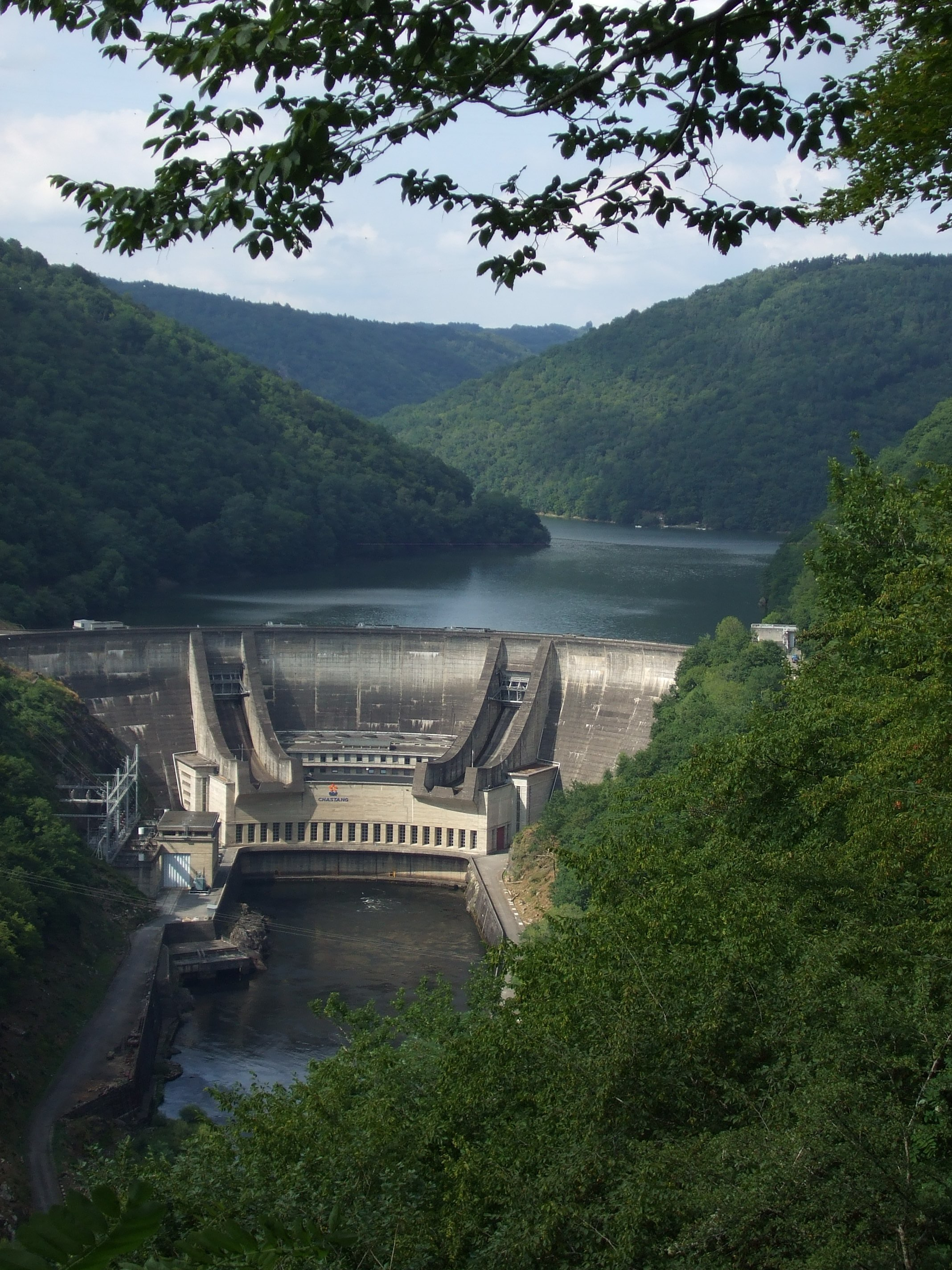 Barrage du Chastang